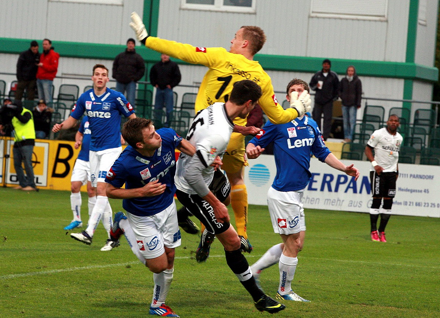 Österreichische Fußballmeisterschaft 2012/13 – Relegationsspiel am 3. Juni 2013 SC-ESV Parndorf vs. FC Blau-Weiß Linz 2:1 (1:0) – Das Bild zeigt Torhüter Daniel Bartosch (FC Blau-Weiß Linz) bei einer erfolgreichen Abwehr.